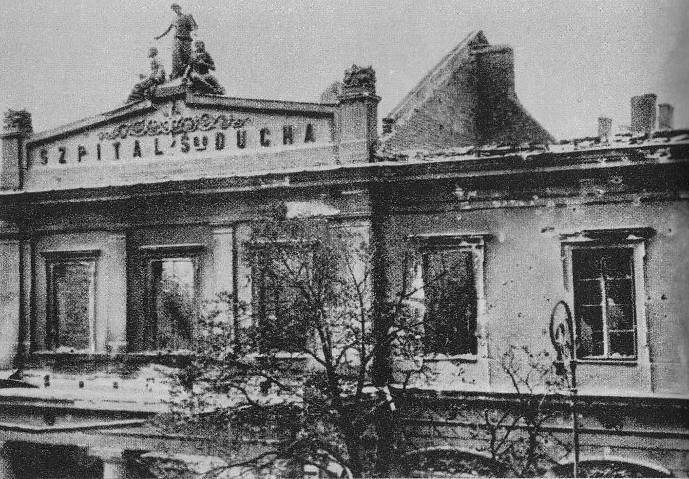 Wypalony Szpital św. Ducha w Warszawie